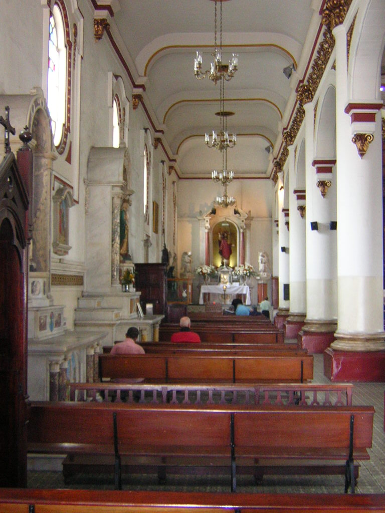 Iglesia San José, Nave Lateral Izquierda, Medellín, Colombia